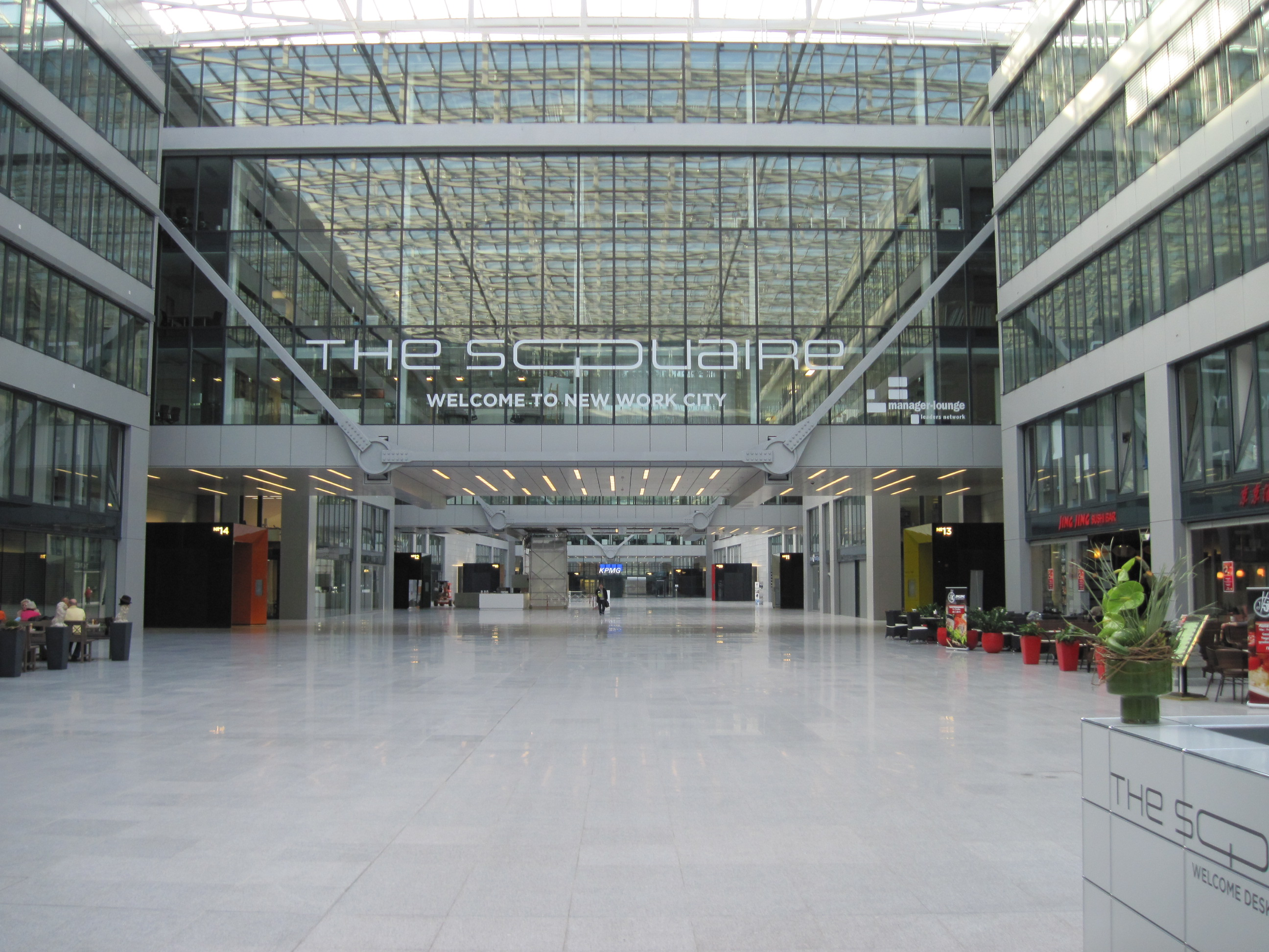 Büros in the Squaire